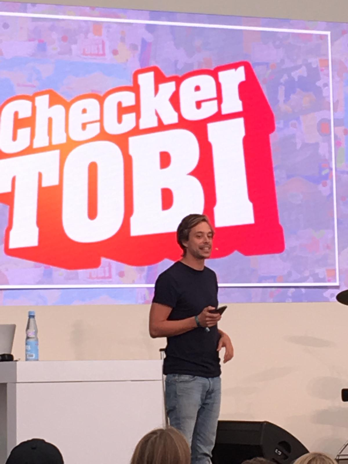 Checker Tobi beim OLB Festival in Oldenburg